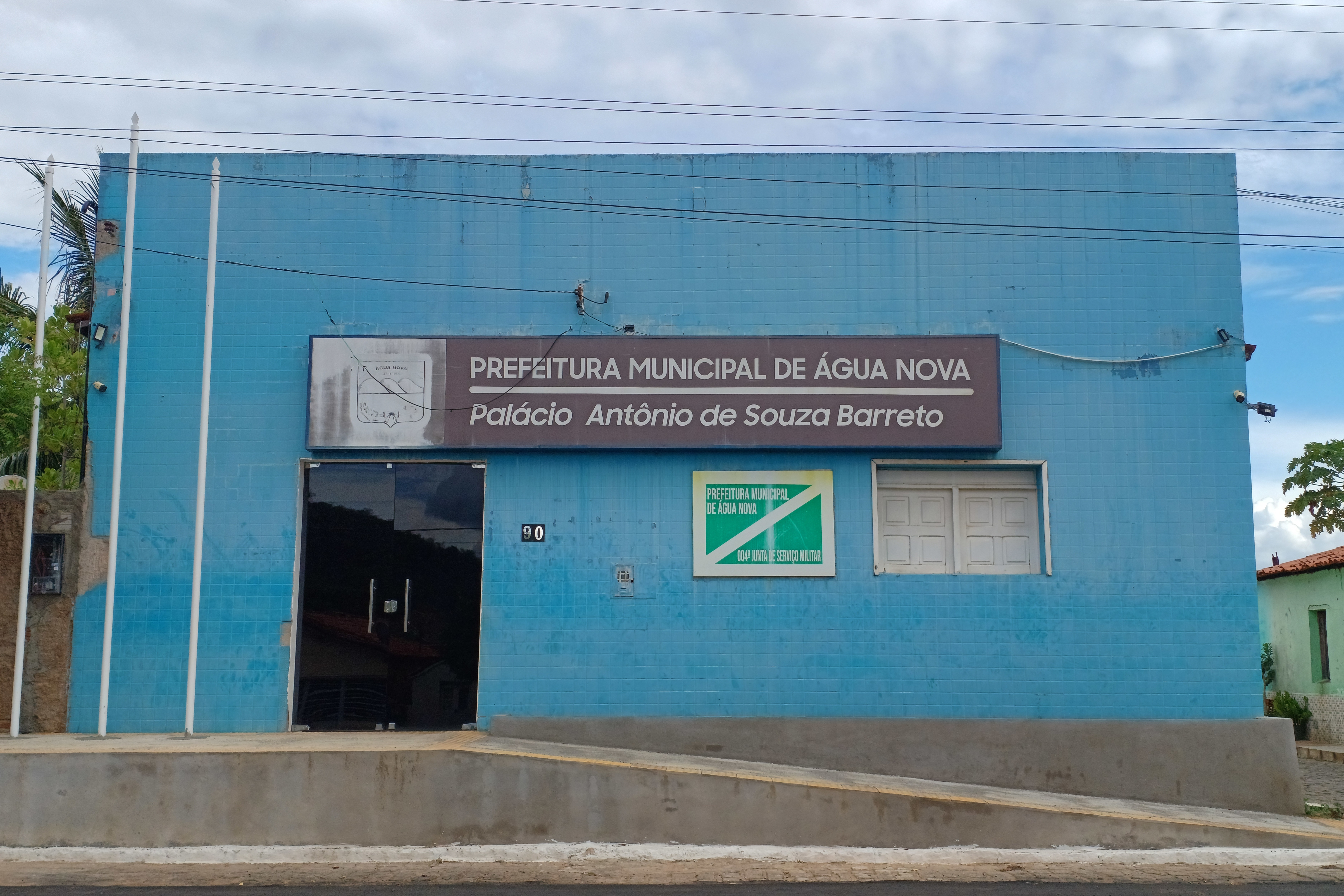 Palácio Antônio de Souza Barreto, onde funciona a prefeitura de Água Nova, Rio Grande do Norte (Brasil).